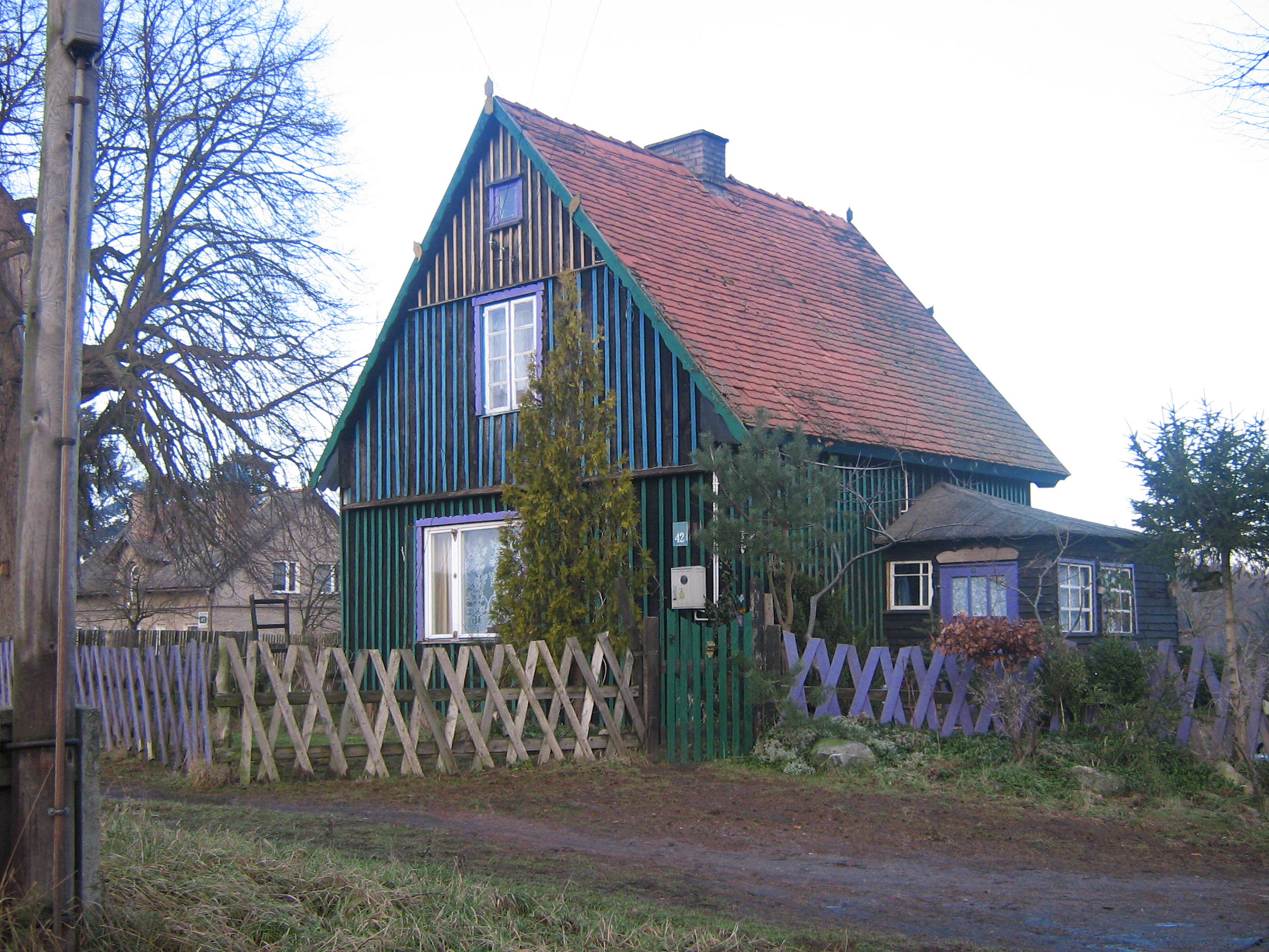 Zabytkowy drewniany dom o numerze 42 w Warnowie